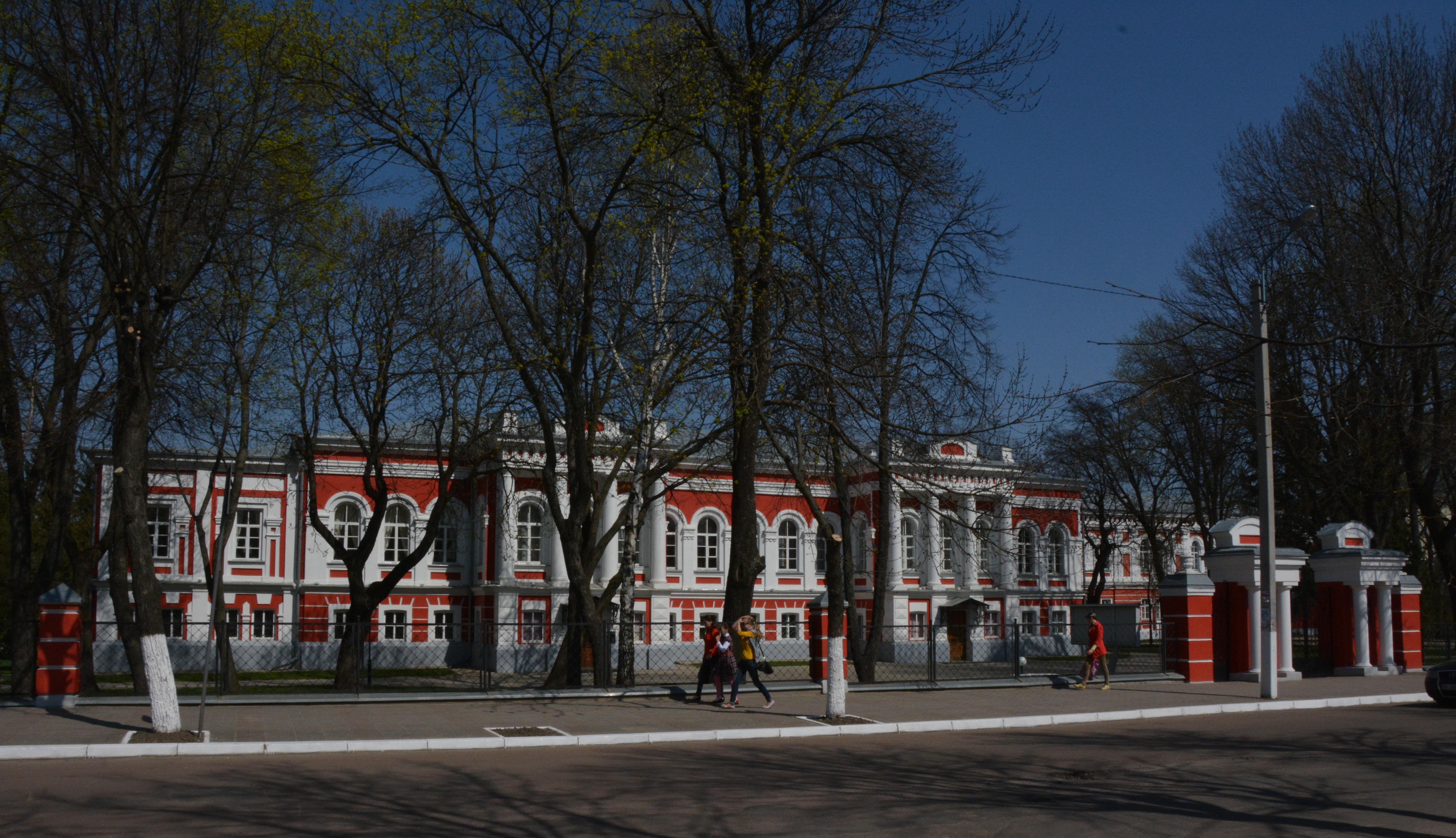 Гуманітарно-просвітницький комплекс, Глухів, вул. Києво-Московська, 24